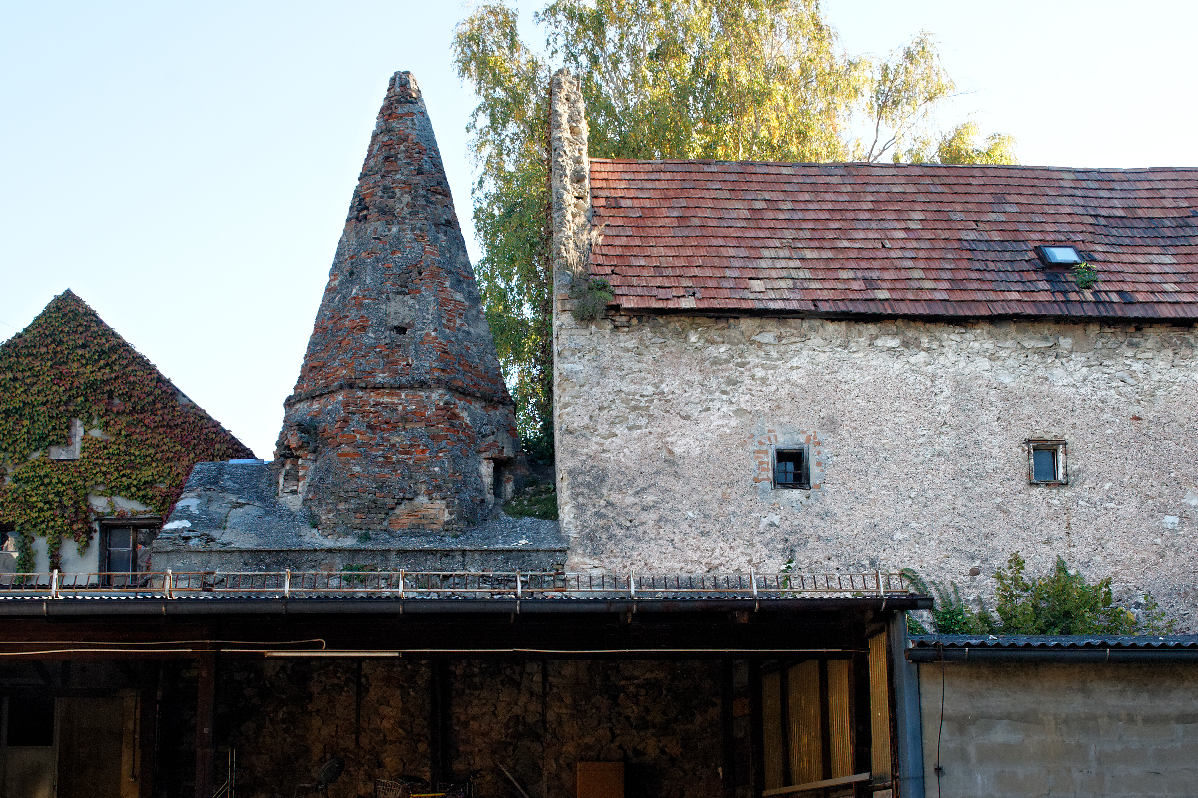 Turmbau der ehemaligen Synagoge in Hainburg an der Donau (Niederösterreich) aus der Mitte des 14. Jahrhunderts. Die anschließende Giebelmauer aus Bruchsteinen ist vermutlich der Rest des einstigen Bethauses.